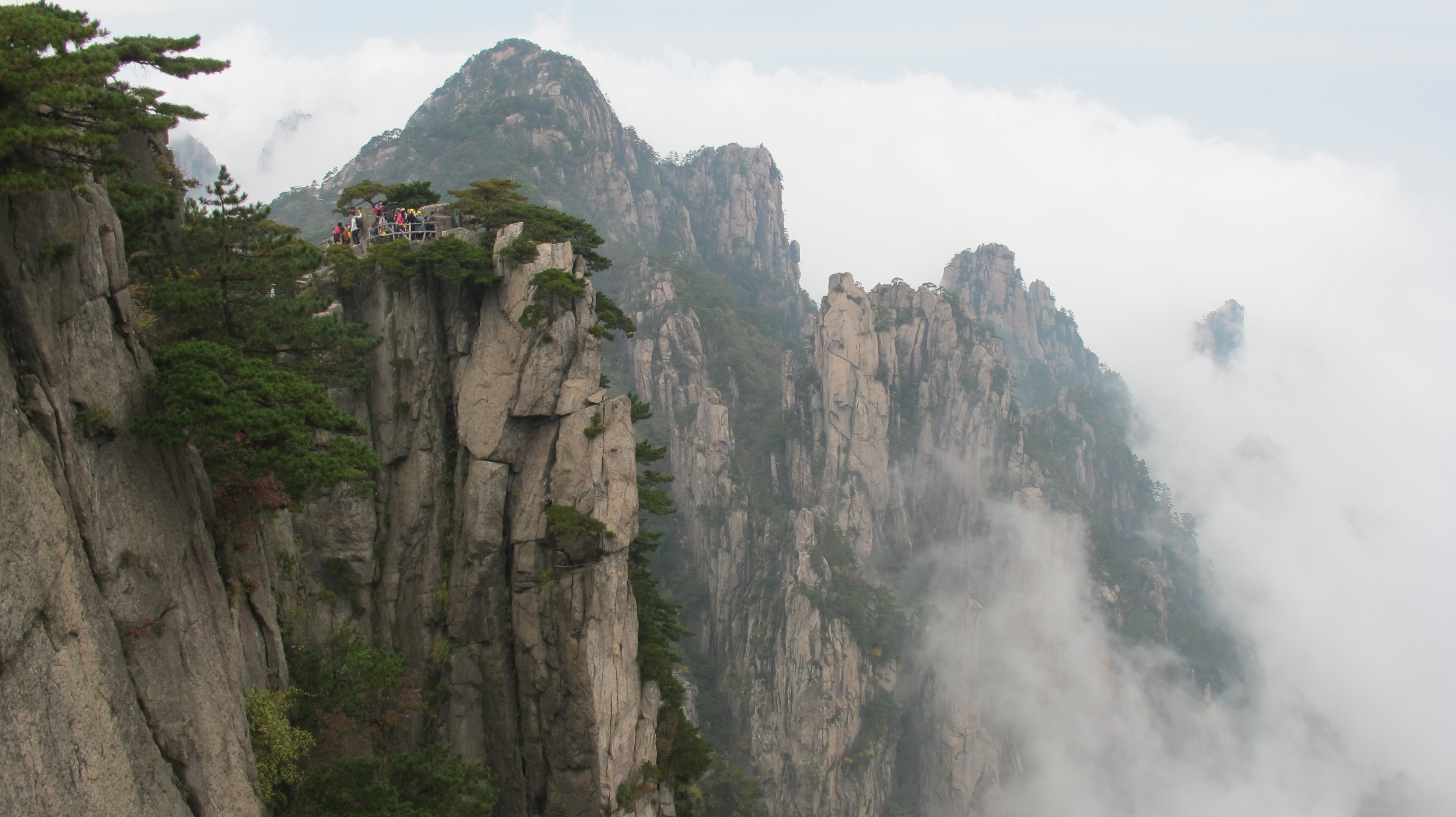 黄山始信峰风光